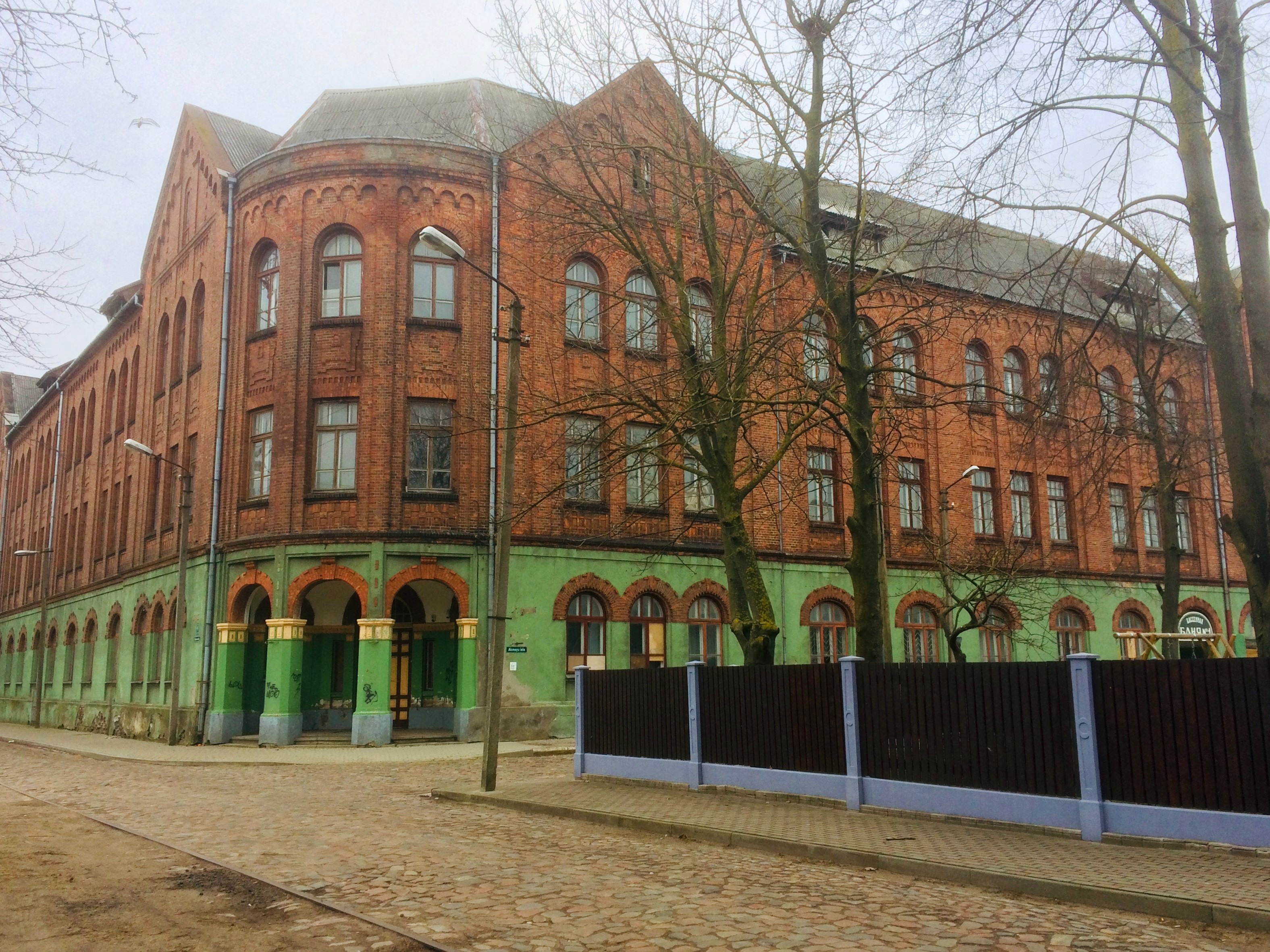 Baseina iela 9, Liepāja